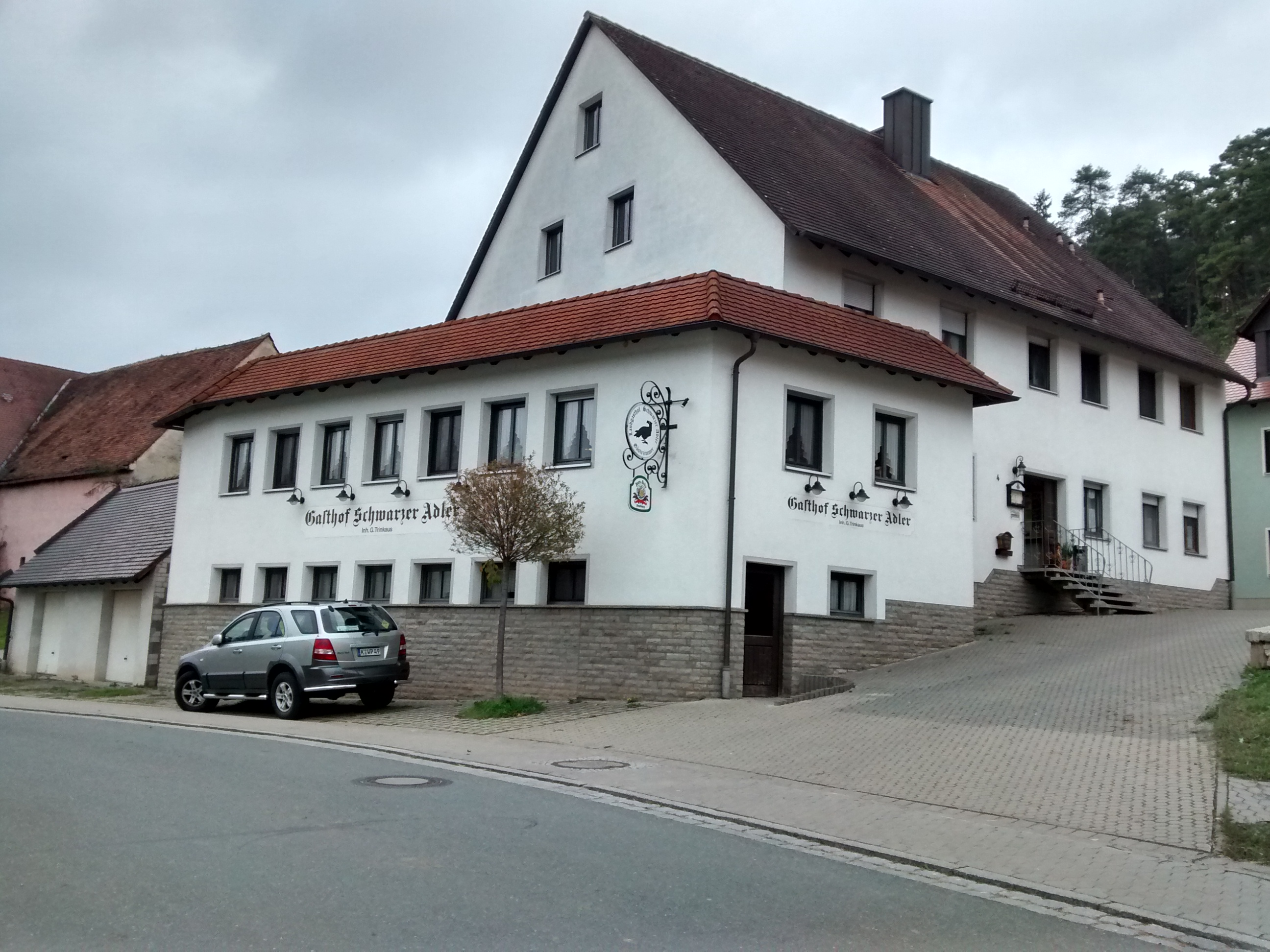 Denkmalgeschützter Gasthof „Schwarzer Adler“ in Warzfelden, Dietenhofen